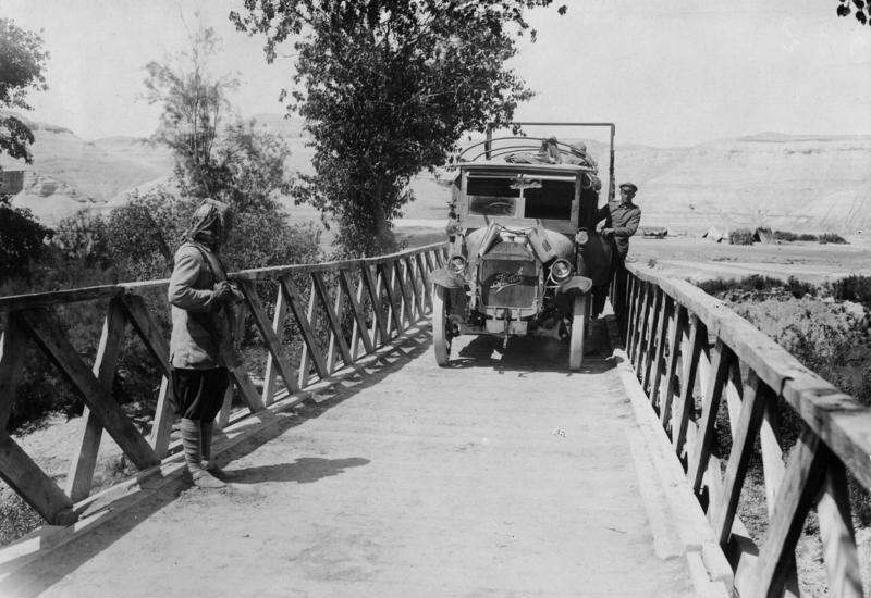 Deutsche Militärlastwagen beim Überqueren einer Jordanbrücke im südlichen Palästina. im April 1917 , südl. Palästina; Filmtrupp Orient/ Bild- und Film-Amt Bildstelle (BUFA)